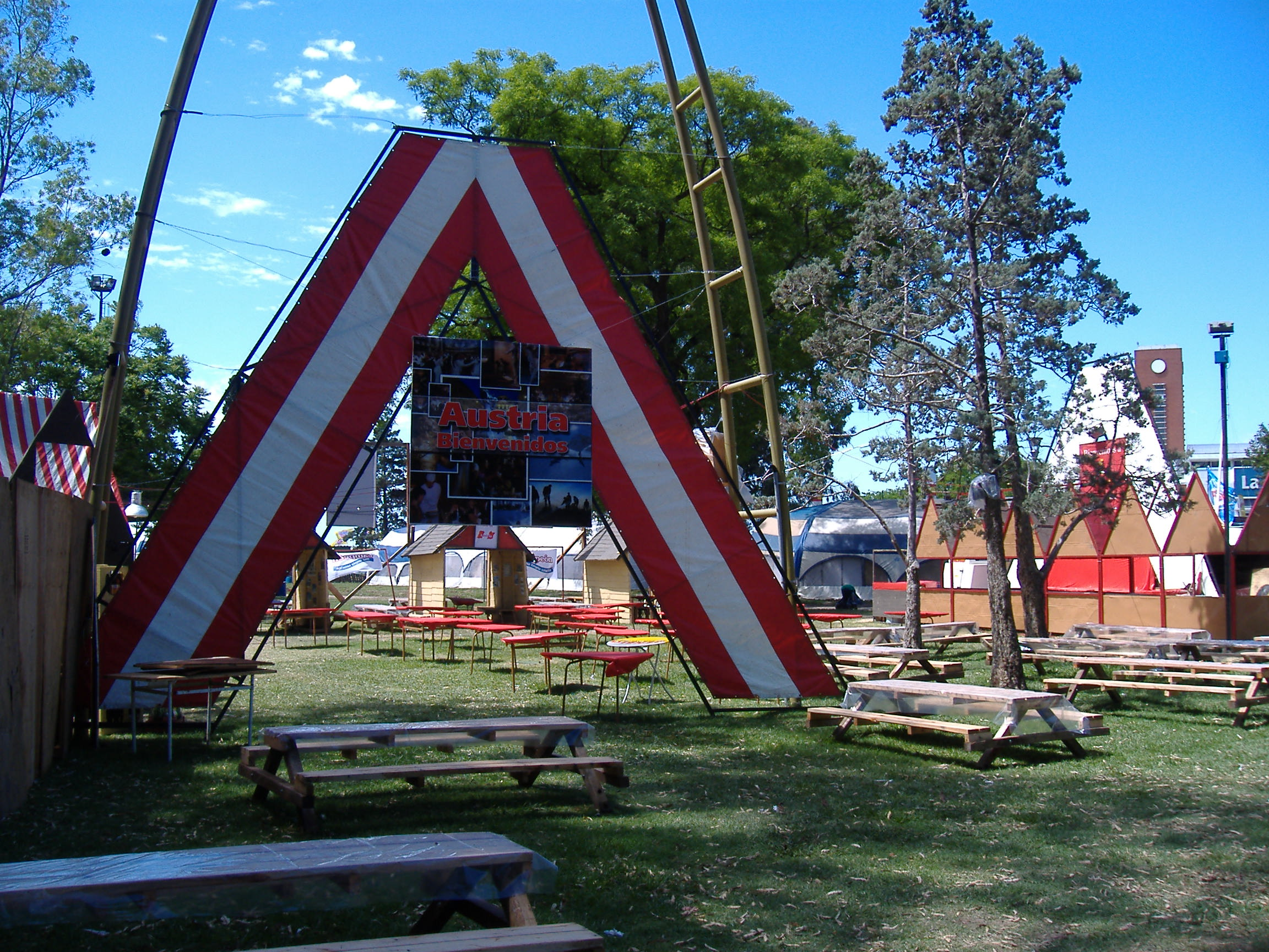 Austria's place at the Encuentro y Fiesta Nacional de Colectividades, Rosario, Argentina.